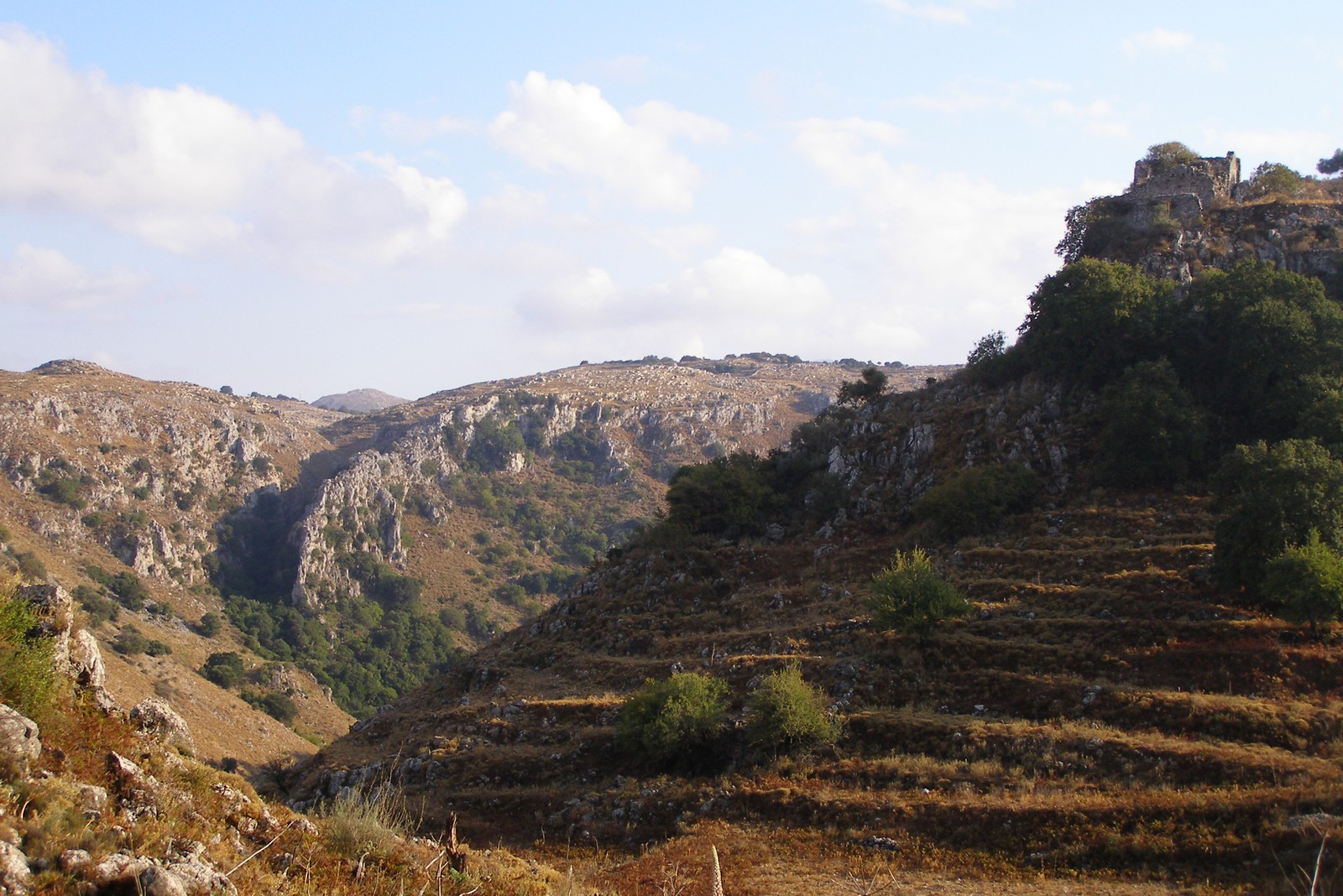 Nordostturm der Festung Bonriparo und Blick in die östliche Schlucht